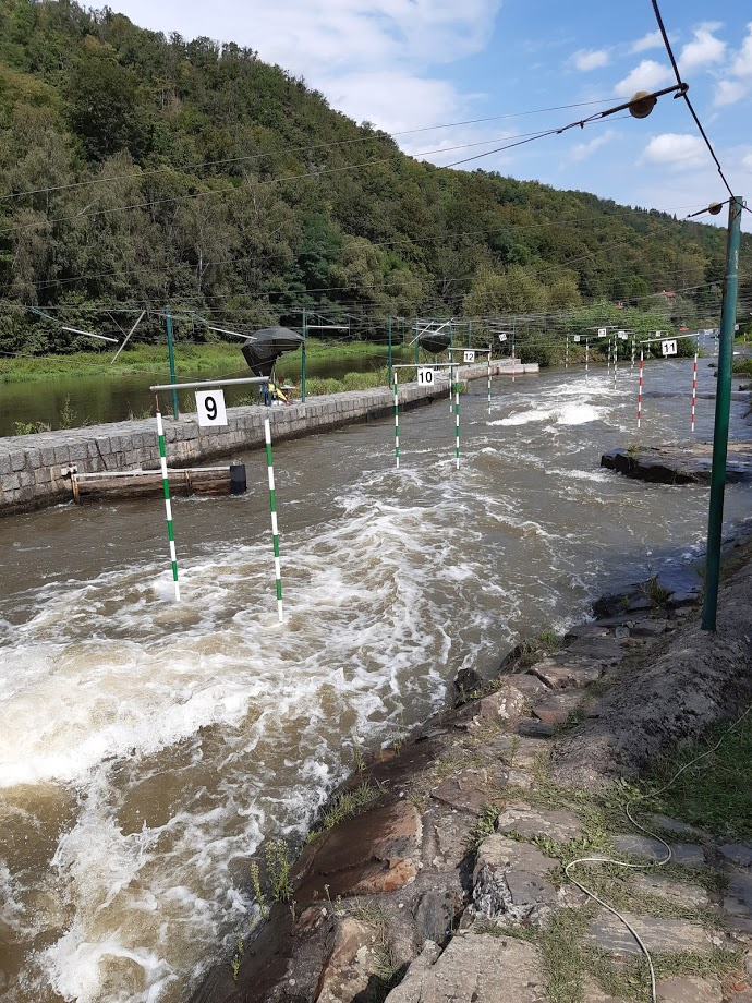 l